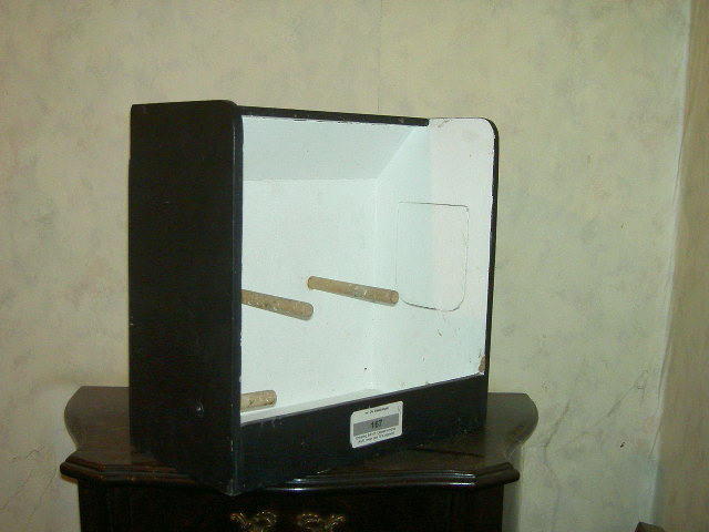 Kanarie TT Kooi